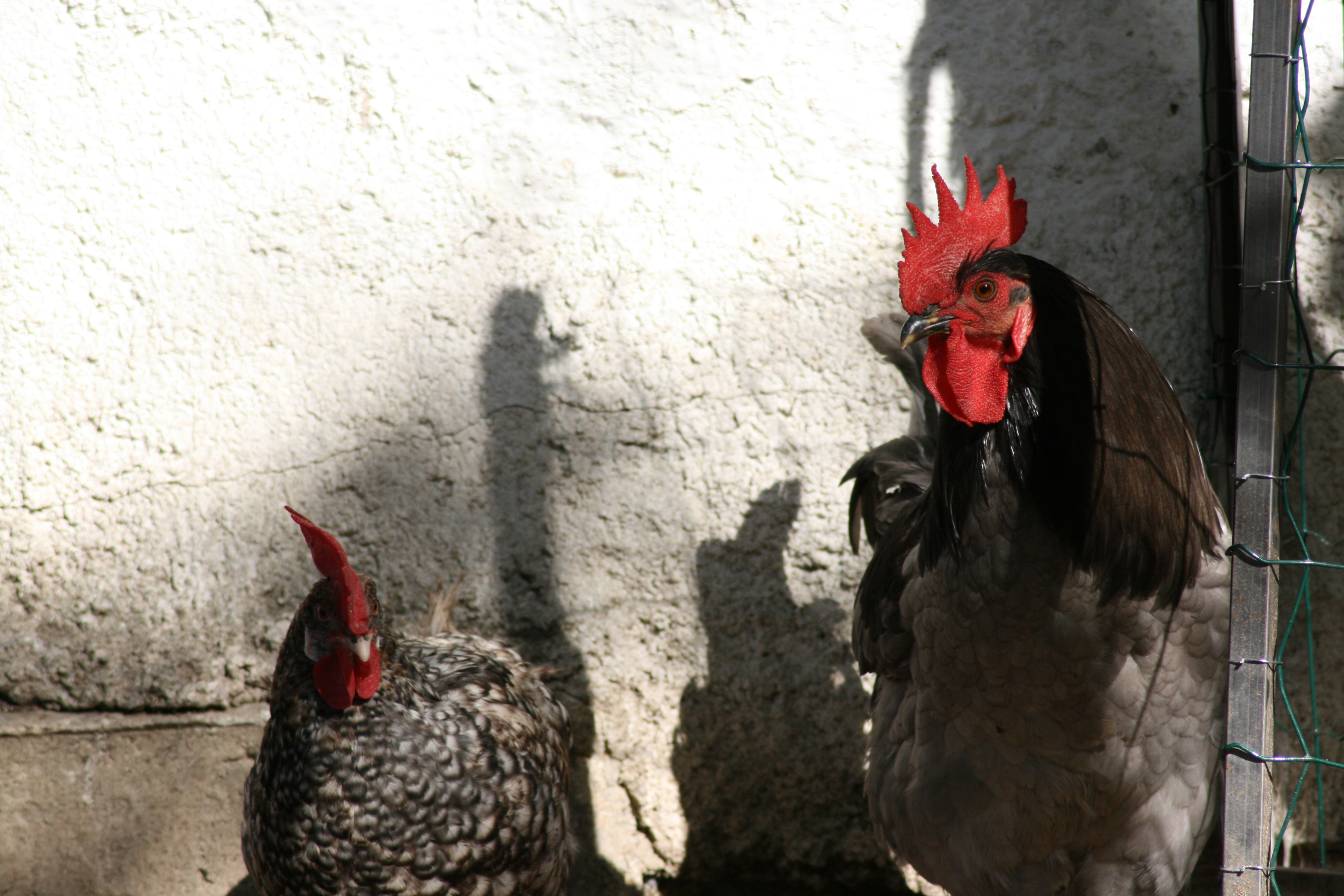 Pareja de Gallus Gallus, un gallo Andaluz Azul joven y una gallina Andaluza Barrada de 2 años de edad. Macarena y Vitorino. Especimenes de la Reserva de la Biosfera de la Fundacion PhoenixArts.